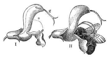 Blüte von Salvia I. mit Andeutung der Lageveränderung des Staubgefäßes (a) zum Griffel (g) II. im Moment eines Hummelbesuchs